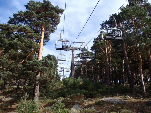 Camino Schmidt- Pista de esquí El Bosque.